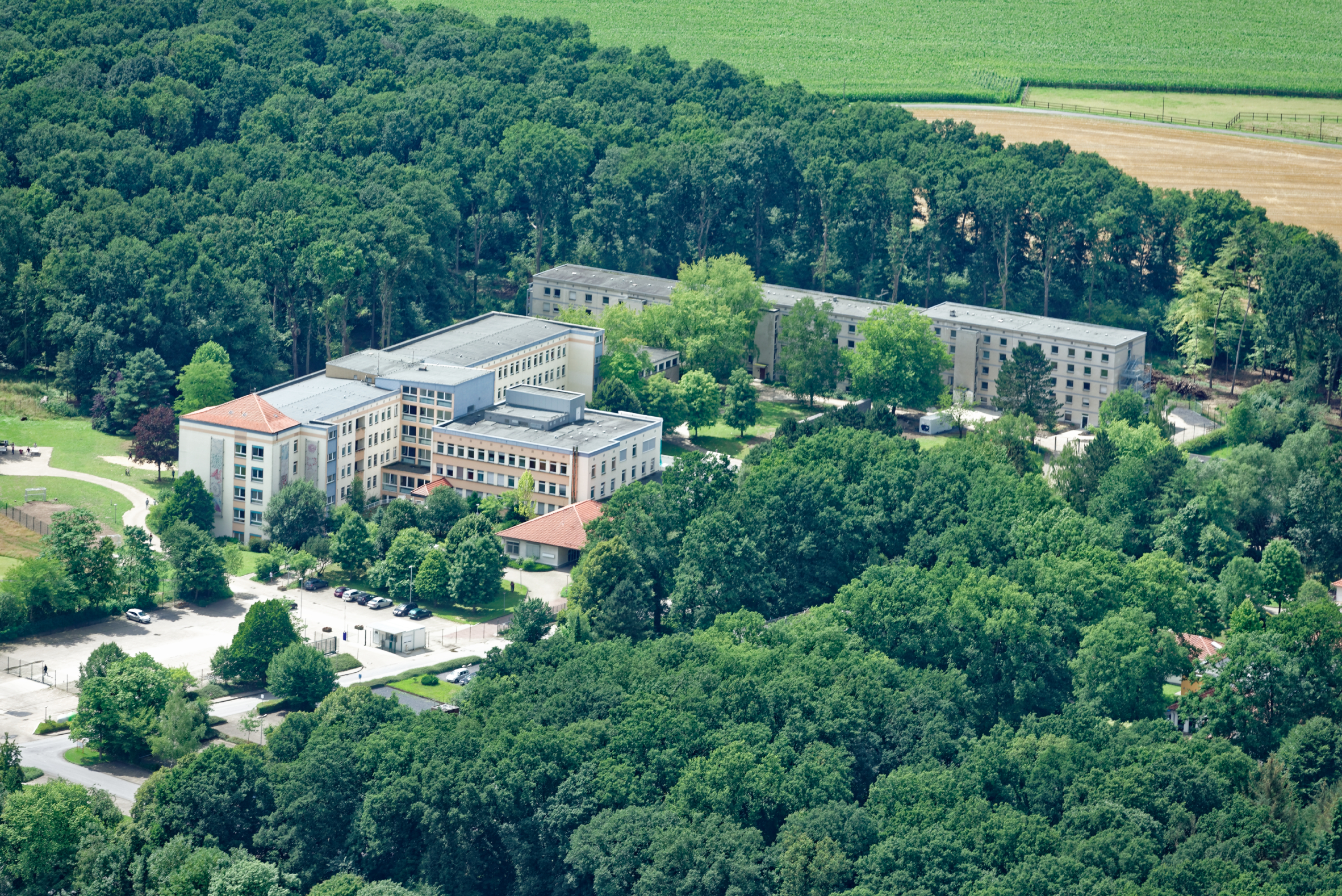 Fotoflug Sauerland West. Ehemaliges Marienhospital in Wimbern, heute zentrale Unterbringungseinrichtung für Asylbewerber.